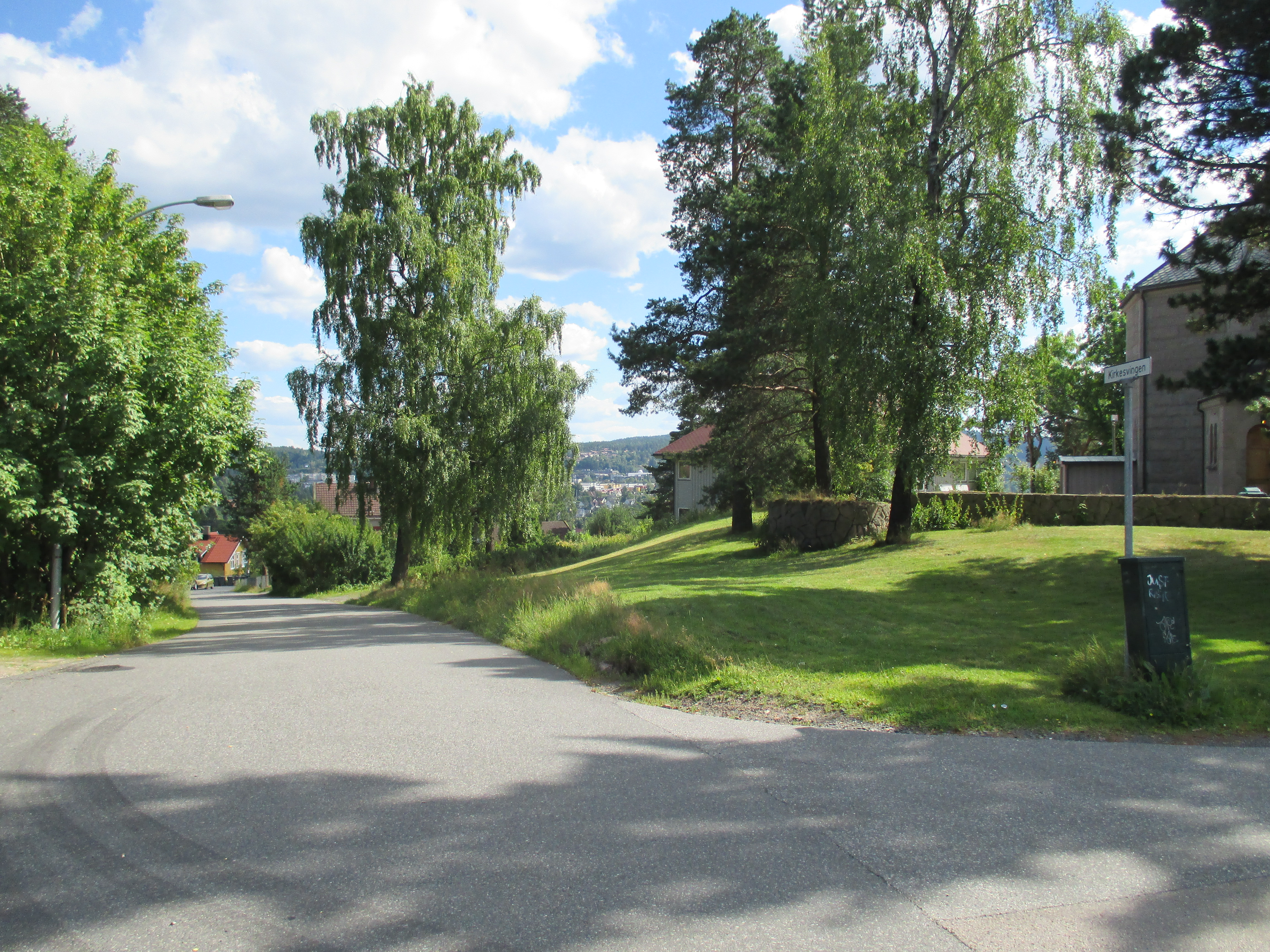 Kirkesvingen på Grorud i Oslo